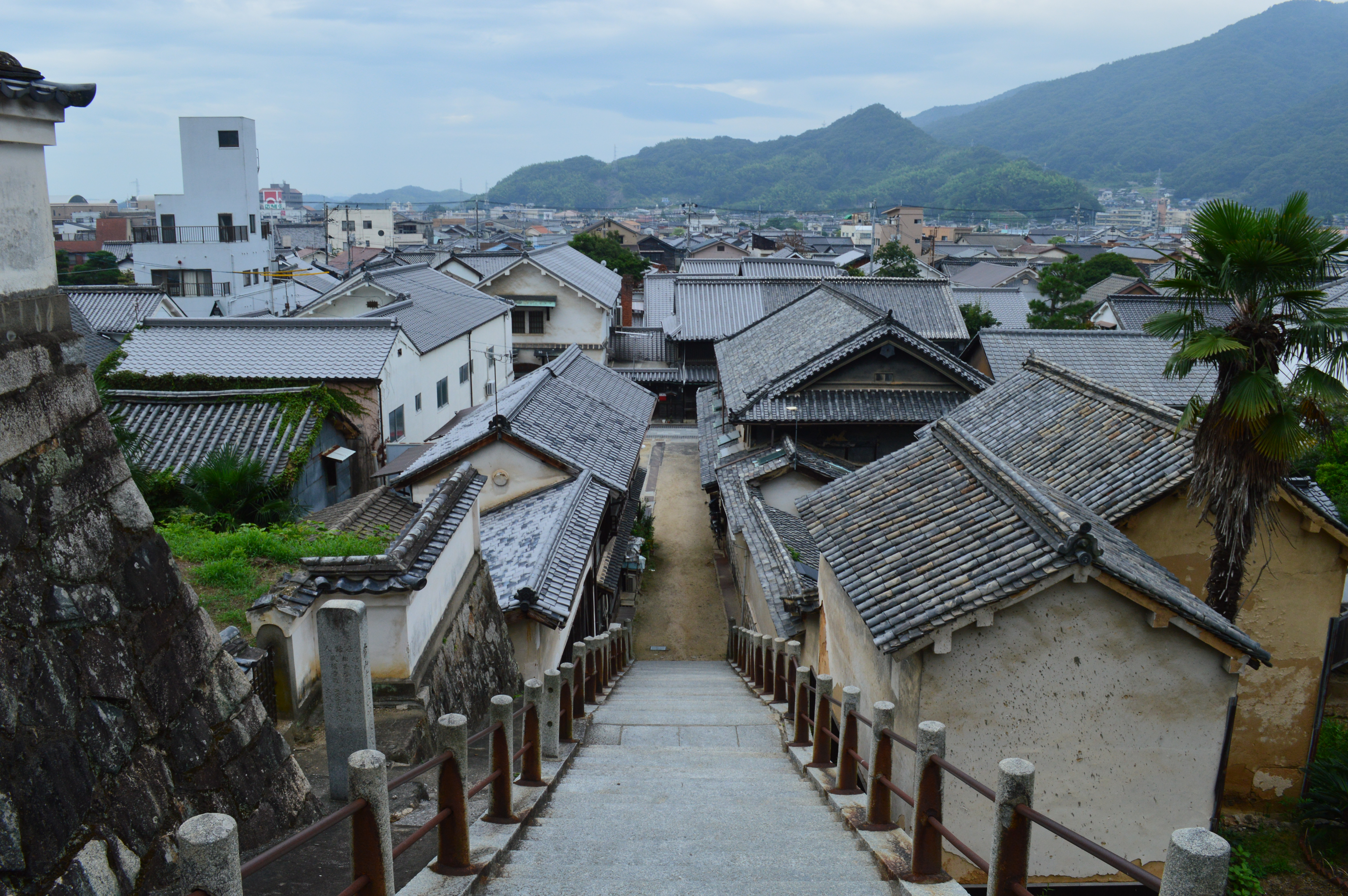 広島県竹原市の歴史地区